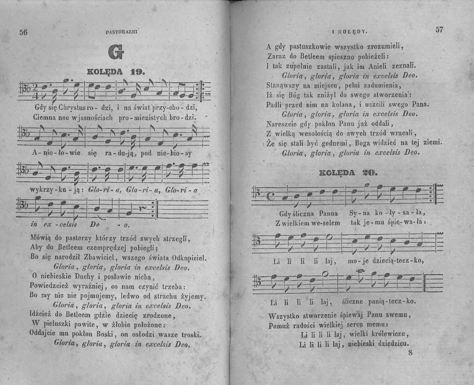 Gdy się Chrystus rodzi, wersja 1843